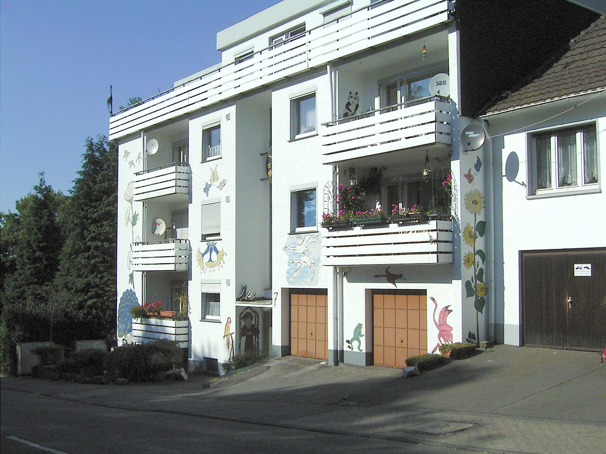 Wuppertal-Zooviertel